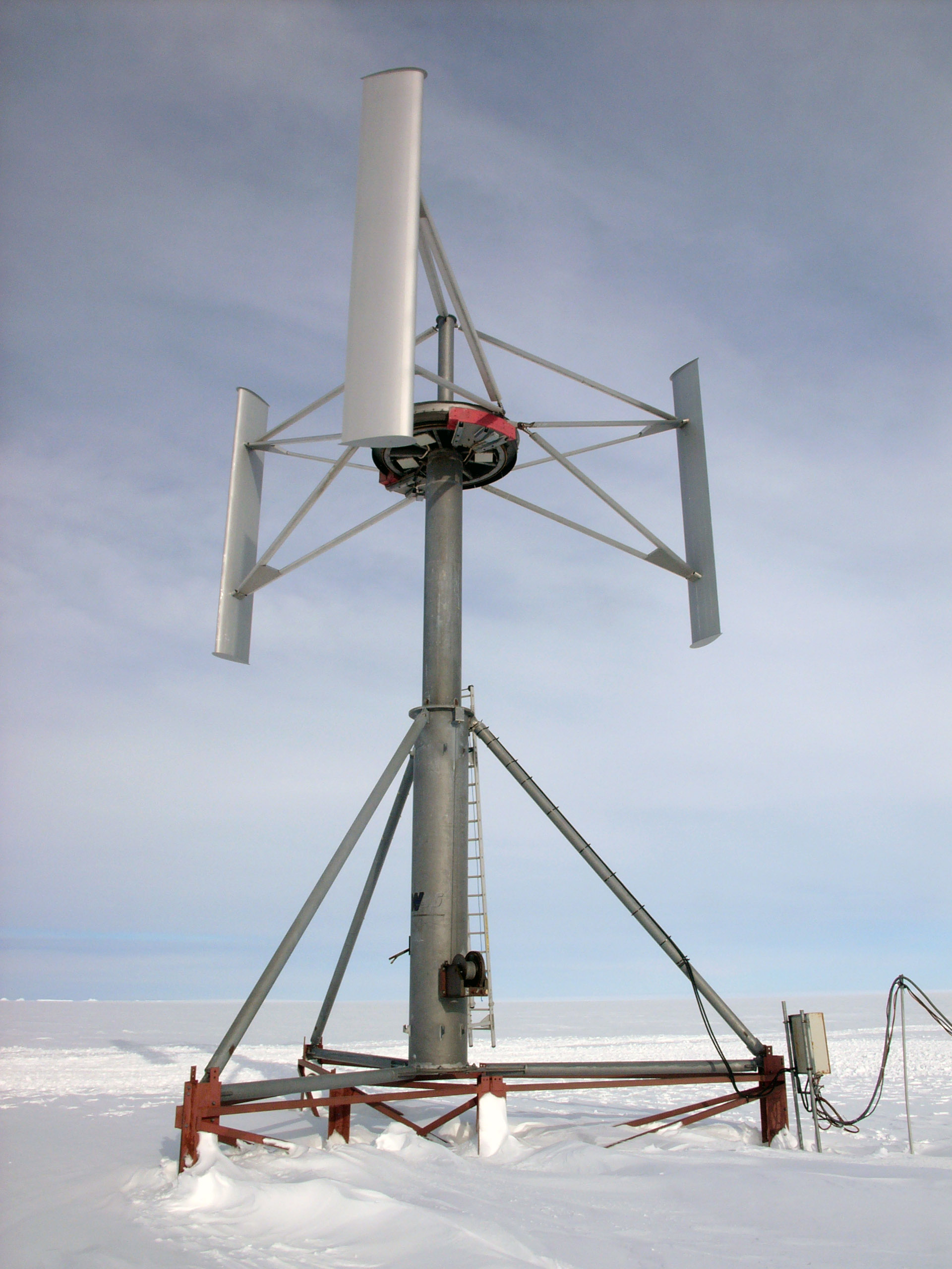 Windgenerator, wind turbine at the German overwintering station Neumayer, Dronning Maud Land, Antarctic H-Rotor (Vertikalachsrotor), HMW 56 Generator, developed by Hochschule Bremerhaven, build by Heidelberg-Motors, Starnberg, 1990 Power: 20 kW Max wind speed: 68 m/s Min. operation temperature: -55° C Snow accumulation: 70 cm/year; the rack below the stand was extended from year to year to compensate snow accumulation Operation: 1991 to 2008-12 Generator Rotordurchmesser: 10.0 m, Überstrichene Fläche: 56 m**2, Zahl der Rotorflügel: 3, Flügellänge: 5.6 m, Flügelbreite: 0.82 m, Nominelle Leistung: 20 kW, Rotornabenhöhe: 10 m über der Schneeoberfläche, R.P.M.range: 30-60 /min, Einschaltgeschwindigkeit: 7 m/s, Ausschaltgeschwindigkeit: 23 m/s, Nominelle Leistung bei: 14 m/s, Generatorgewicht: 2.8 t, Turmgewicht: 2.5 t Reference: Götz et al. (1993) Umweltschonende Energiegewinnung in der Antarktis. Die Geowissenschaften; 11, 12; 419-420